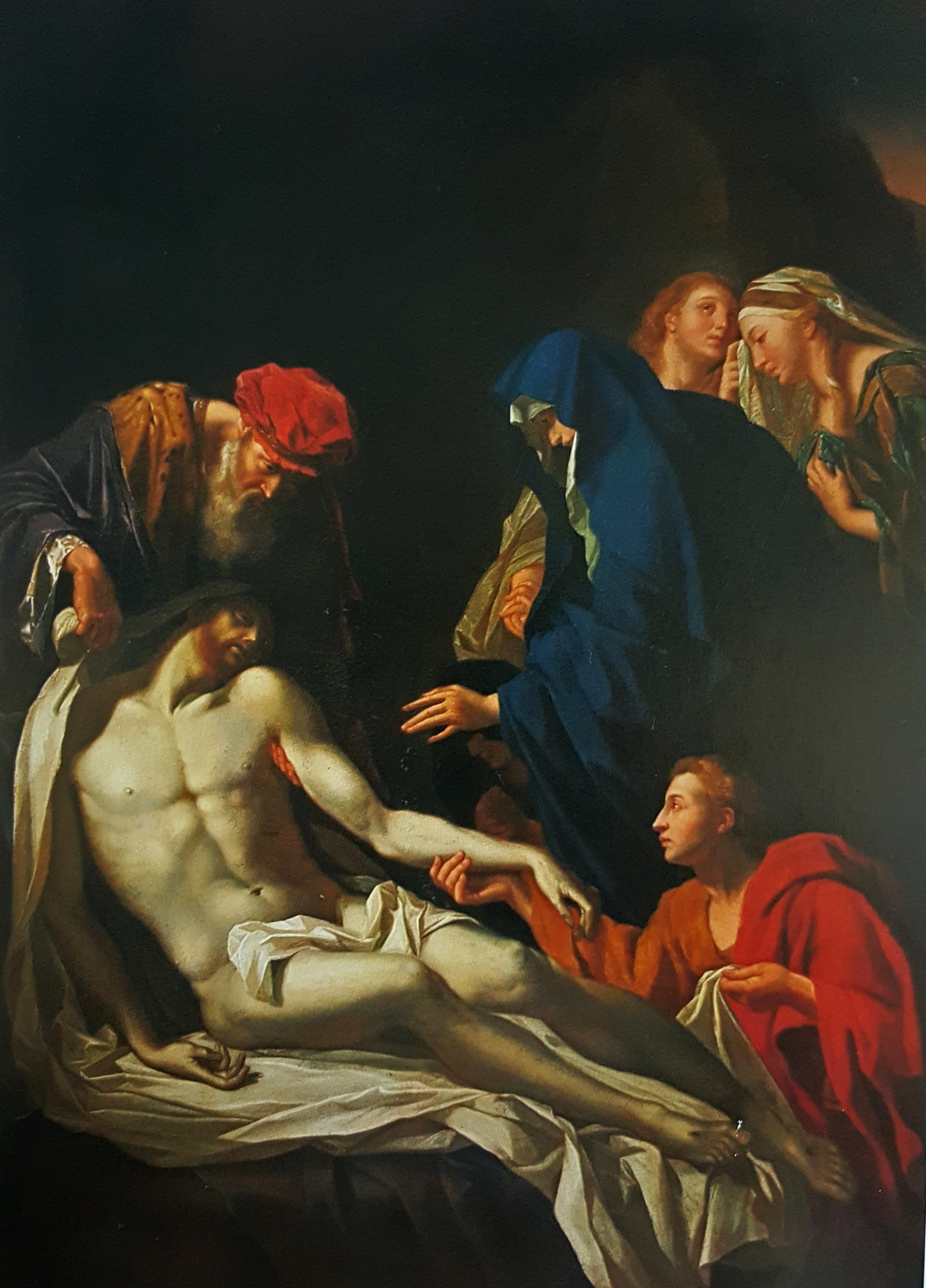 "Złożenie Chrystusa do grobu" Adriaen van der Werff po 1703, Muzeum Narodowe we Wroclawiu.